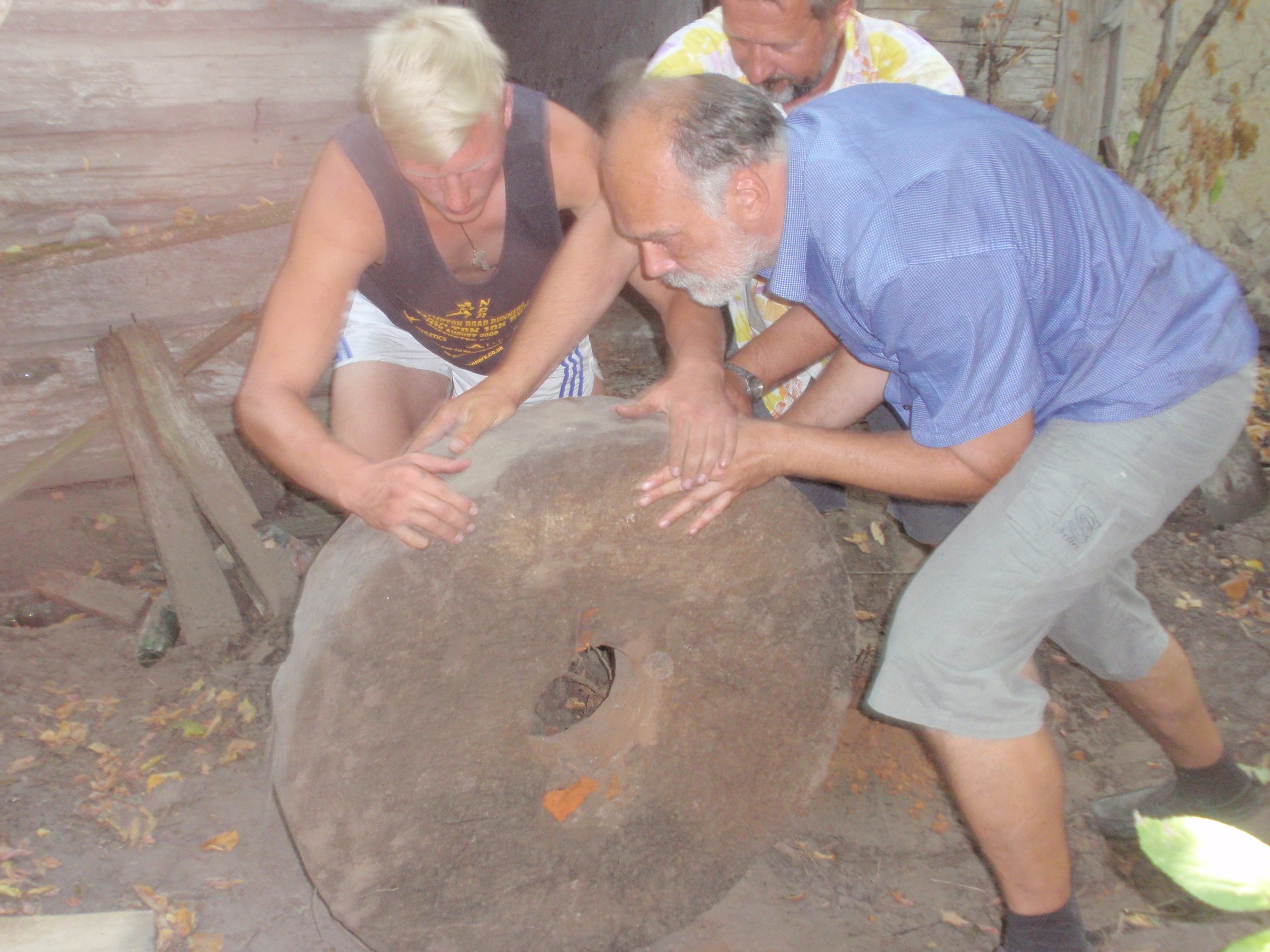 Знайдений млин на території Кербутівського(Новомлинського) монастиря